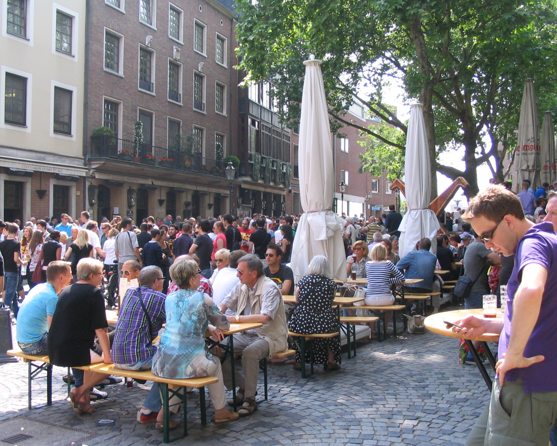 Die Düsseldorfer Altstadtkneipe Uerige an einem schönen Samstagnachmittag im Mai 2011.